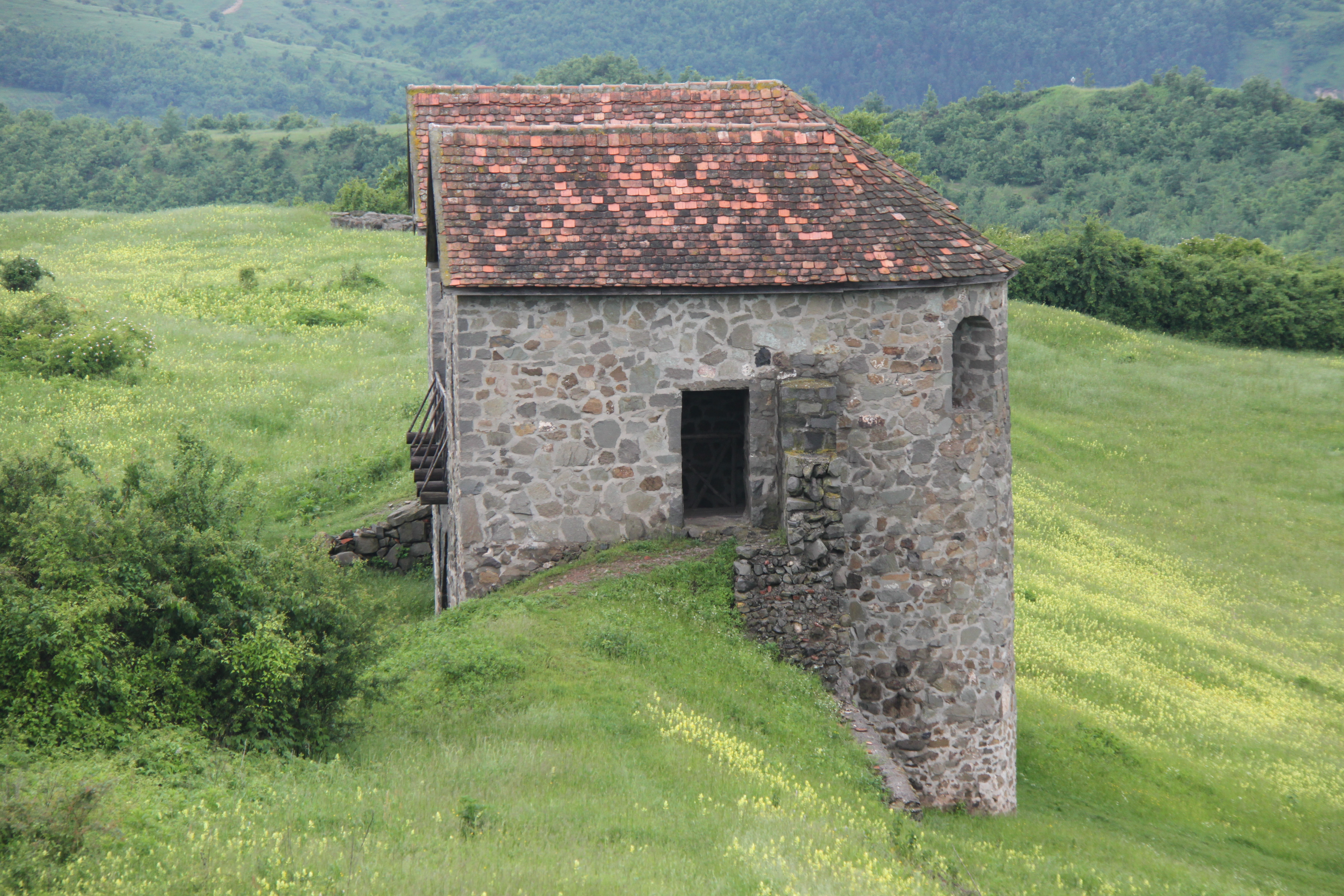 Salaj - Mai 2010